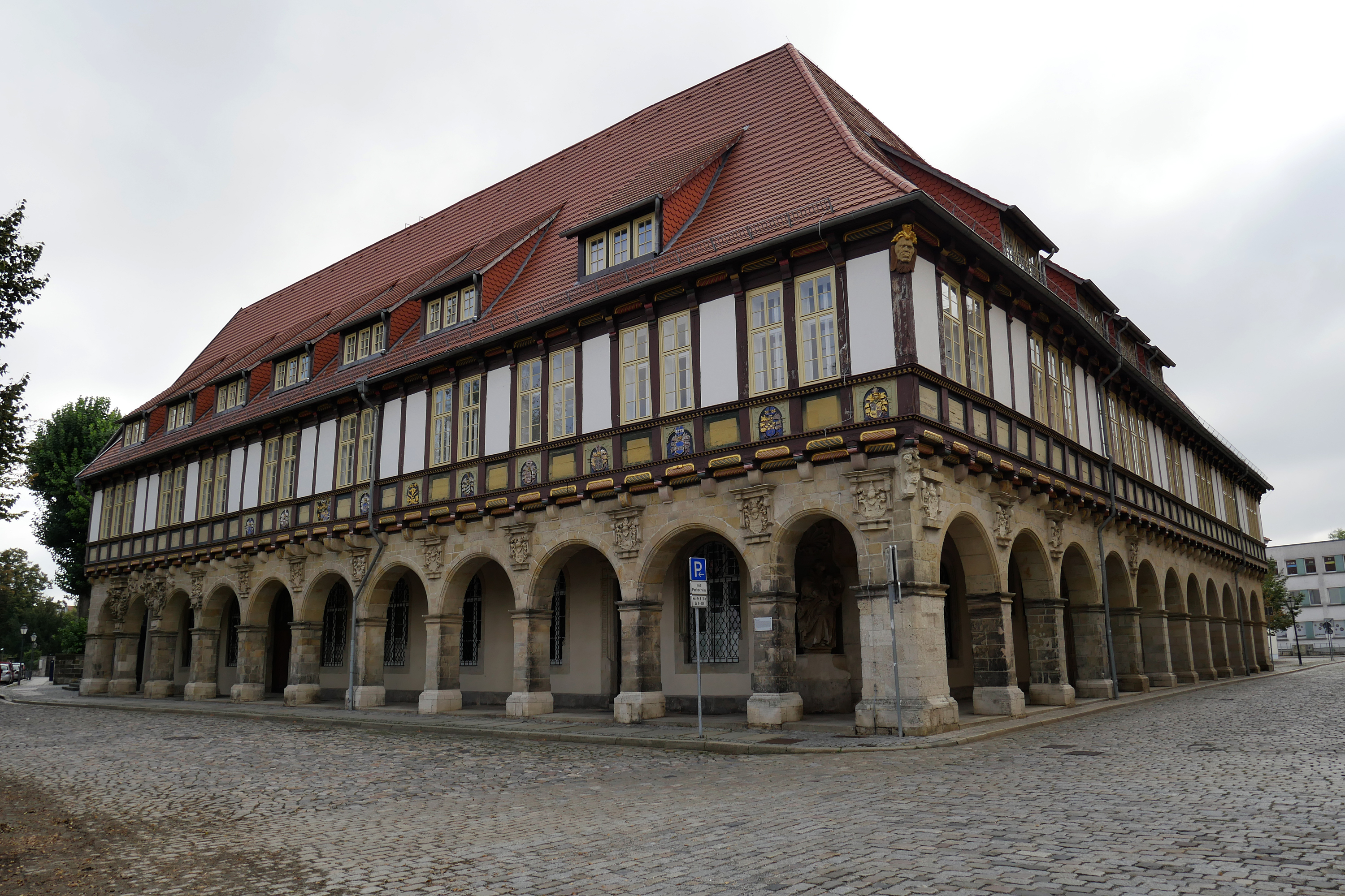 Dompropstei in Halberstadt